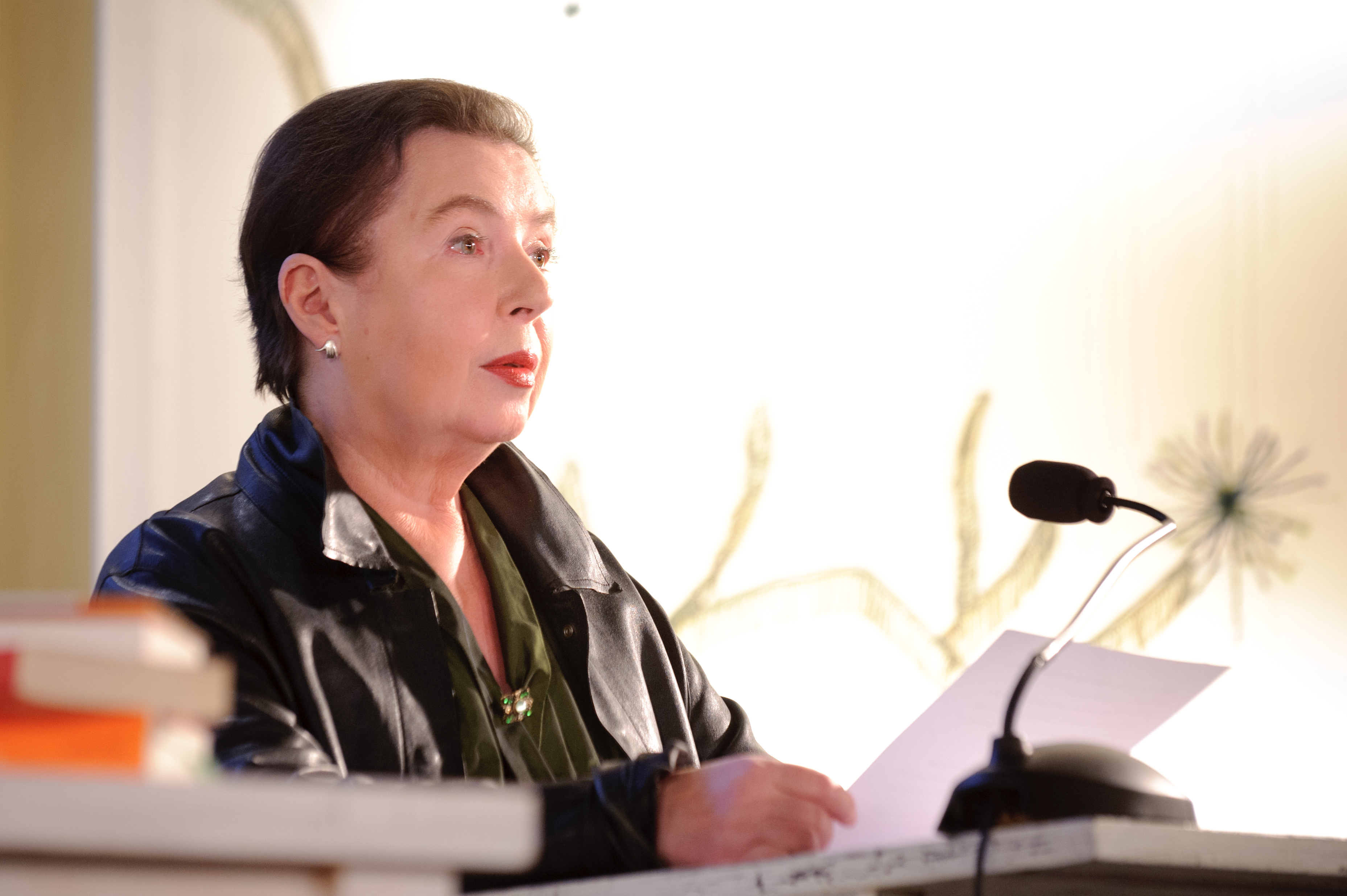 Simone von Zglinicki (Schauspielerin, Deutsches Theater Berlin) Der Literarische Abend mit A. L. Kennedy A. L. Kennedy zu Gast bei den Schriftstellerinnen Hilal Sezgin und Veronika Peters, Mai 2012 Fotos: Stephan Röhl